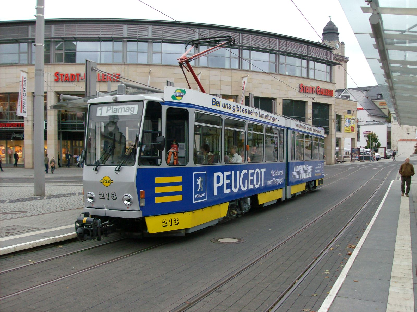 Tw 213 an der Zentralhaltestelle Tunnel, Plauen